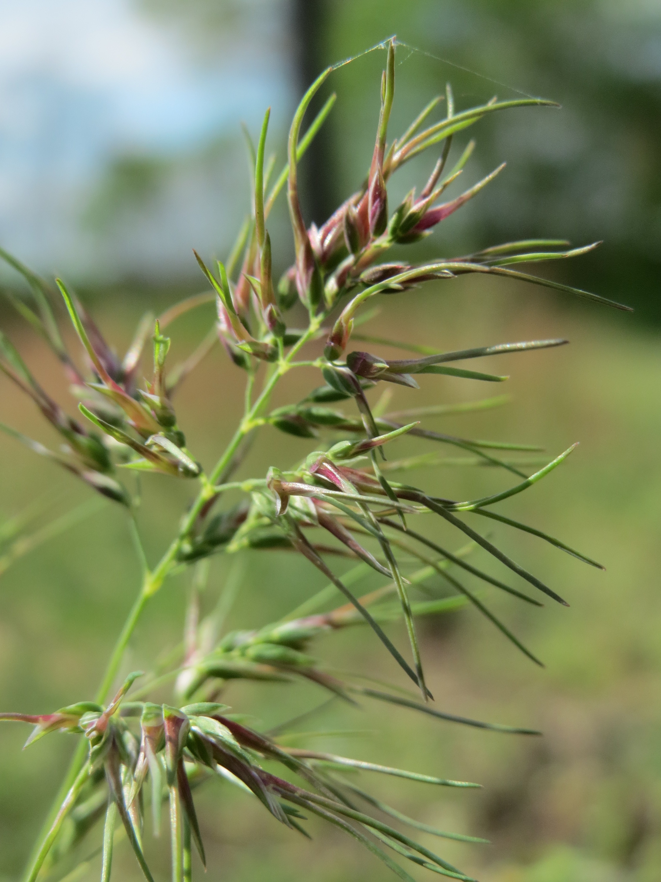 Zwiebel-Rispengras (Poa bulbosa) in Hockenheim